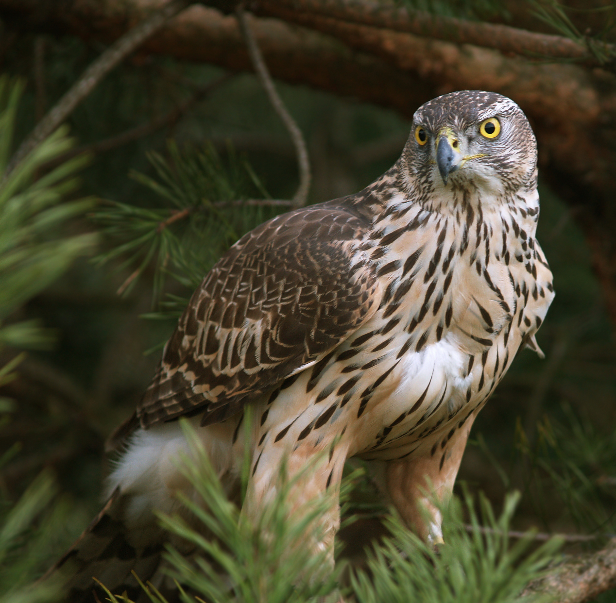 Młody jastrząb w ,,pierwszym piórze""